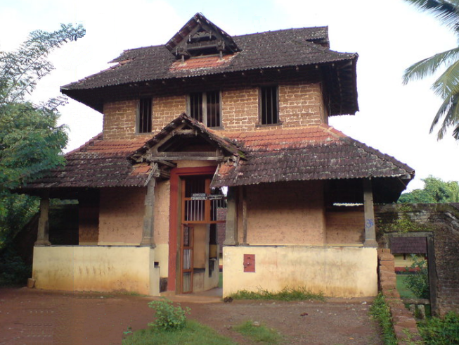 നെടുമ്പുര മഹാദേവ ക്ഷേത്രം കിഴക്കേ ഗോപുരം